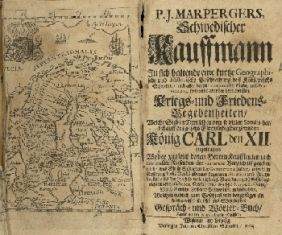 Paul Jacob Marpeger przewodnik po Szwecji dla Niemców (Beschreibung deß Königreichs Schweden ... Kriegs- und Friedensbegebenheiten ... biß auff den anjetzo glorwürdigst regiernden König Carl den XII zugetragen. Wobey zugleich denen Herren Kauffleuten und curieusen Reisenden eine accurate Verzeichniß gegeben wird, was sie in Schweden der Commercien halber ... als der (nach so vielen Königl. Verordnungen) wohleingerichten Manufacturen, Seefahrten, Wechsel-Negotio, Münß, Maaß, Gewicht, Zoll- und Postwesen zu beobachten ... Gespräch- und Wörterbuch) wydany w 1706 w Lipsku - okładka